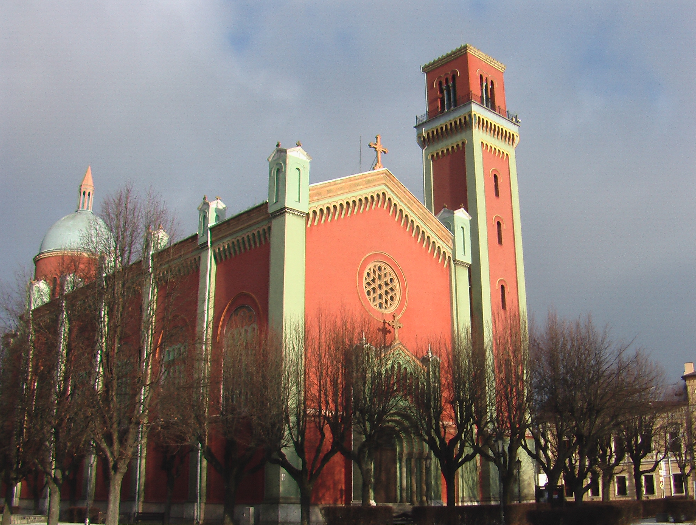 Kezmarok: Neue evangelische Kirche